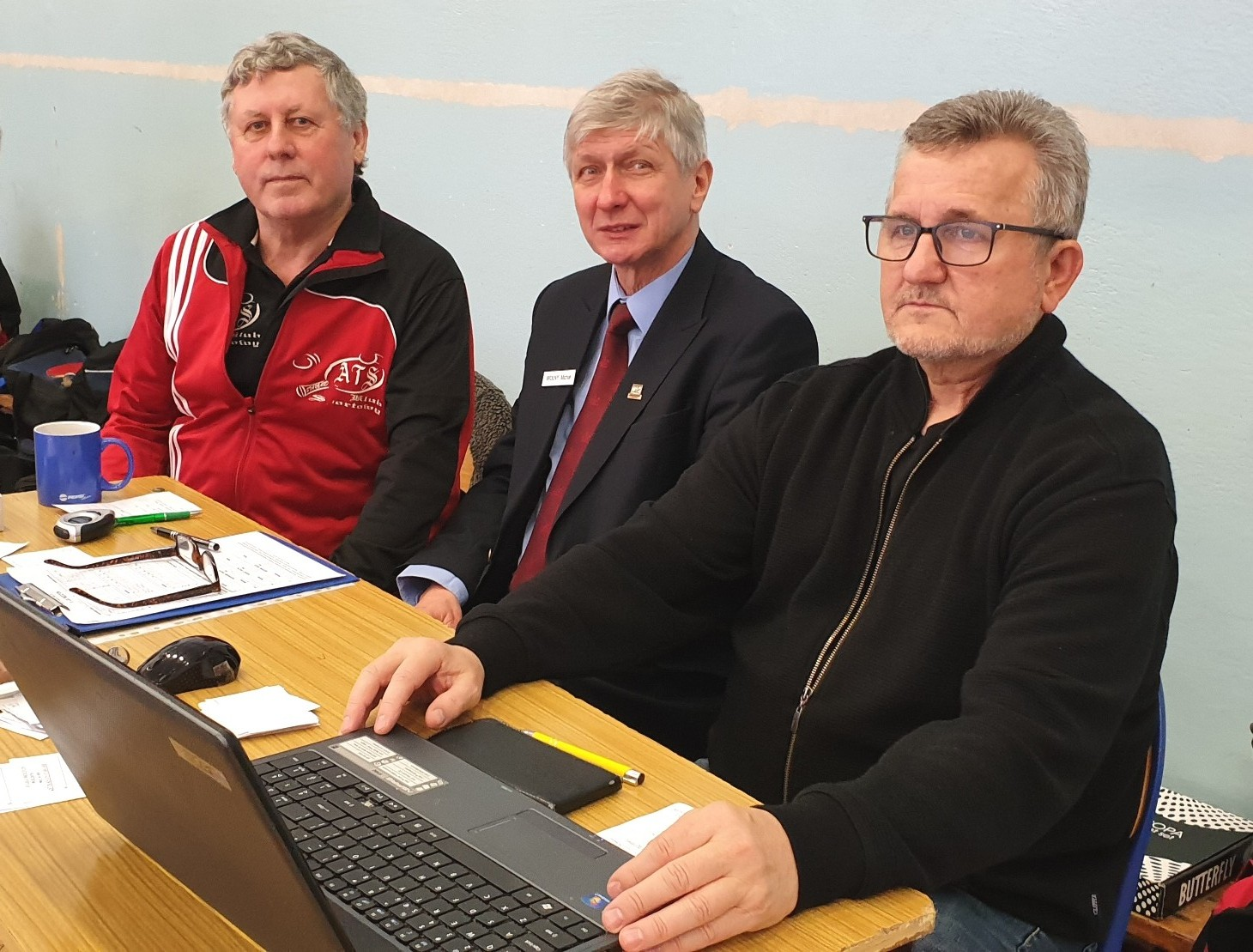 Działacze KS ATS Stargard